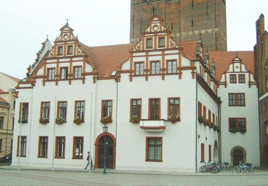 Rathaus der Stadt Stendal in Sachsen Anhalt